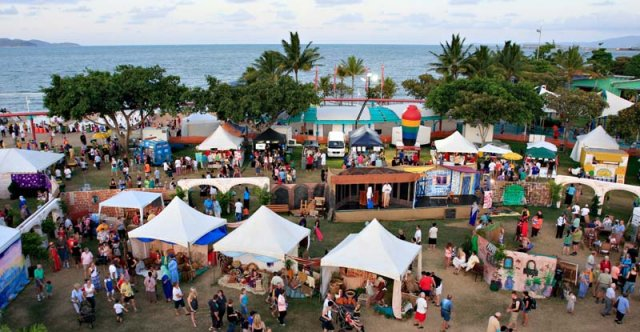 Village View